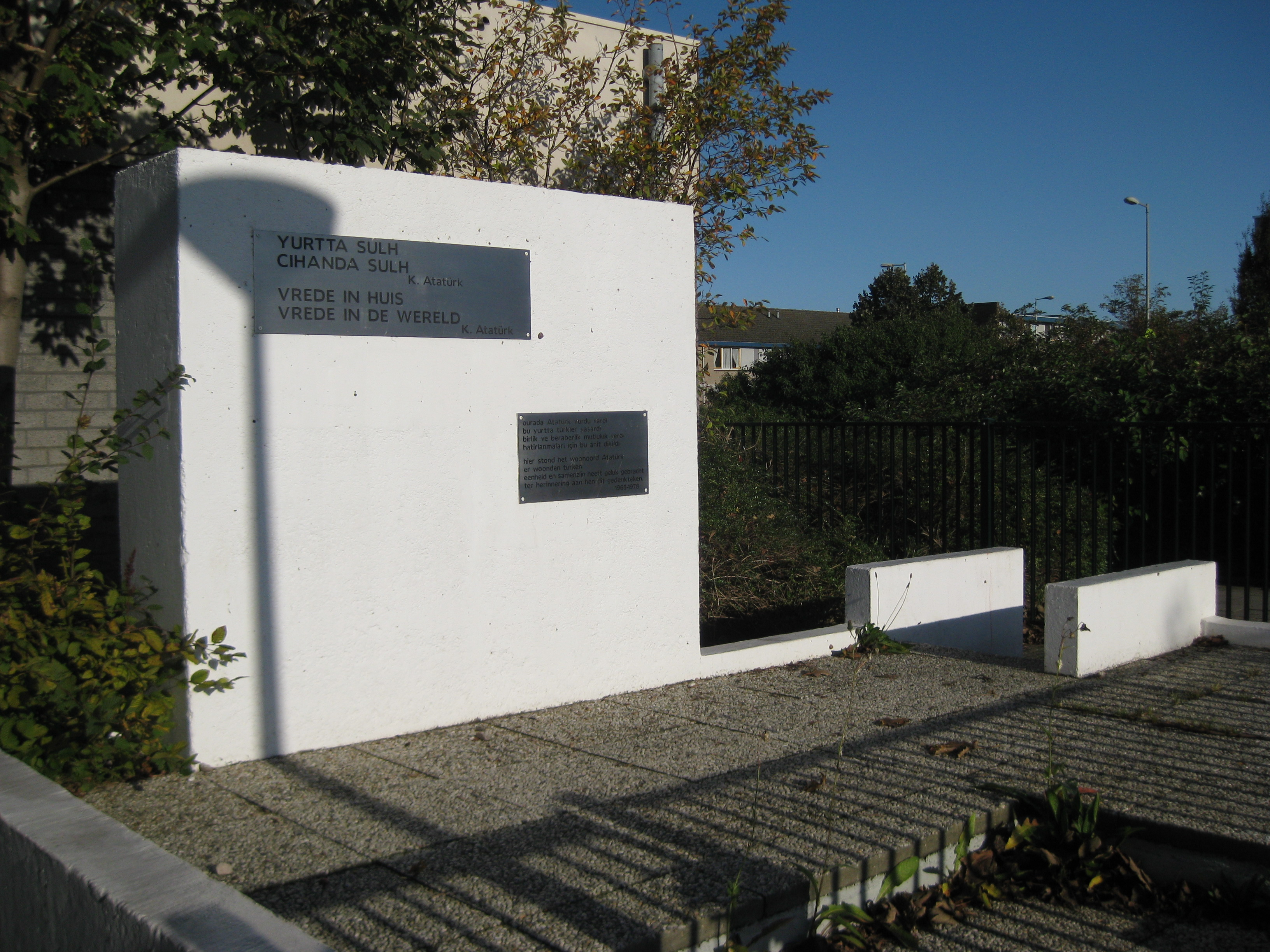 Gedenkteken aan Atatürk, Amsterdam-Noord. 1978 M. Türkmen.